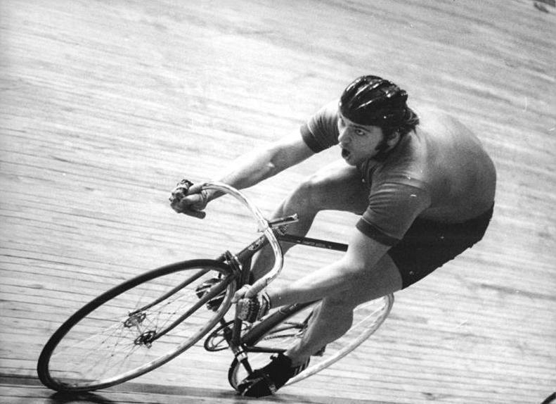 Emanuel Raasch ADN-ZB Mittelstädt 23.1.77-pom.-Berlin: DDR-Bahnmeisterschaften im Radsport - Werner-Seelenbinder-Halle - DDR-Sprintermeister wurde der Berliner Emanuel Raasch vom SC Dynamo Berlin.